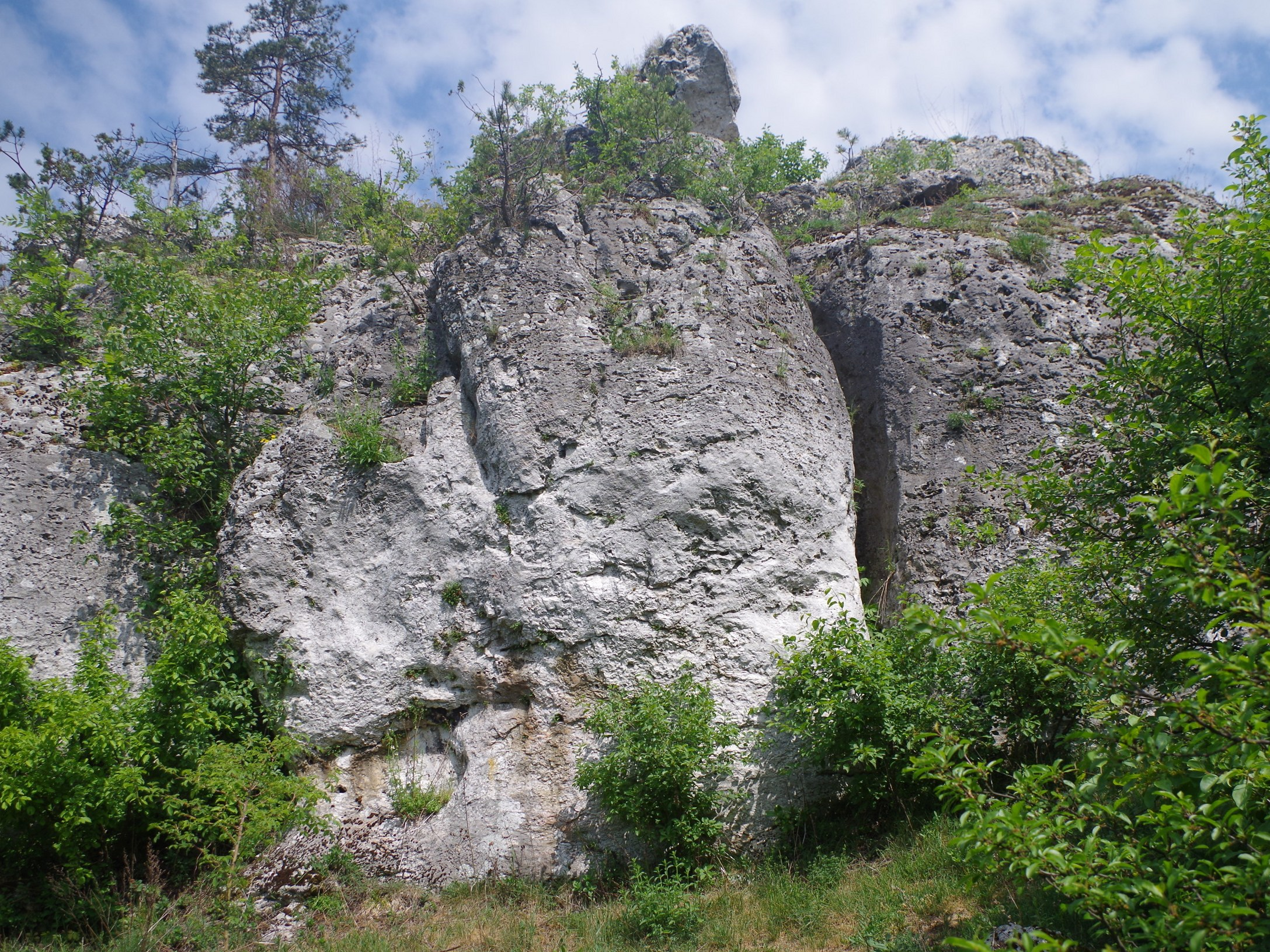 Straszykowe Skały w Ryczowie